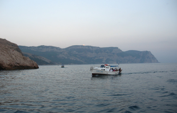 Cape Aya, Sevastopol